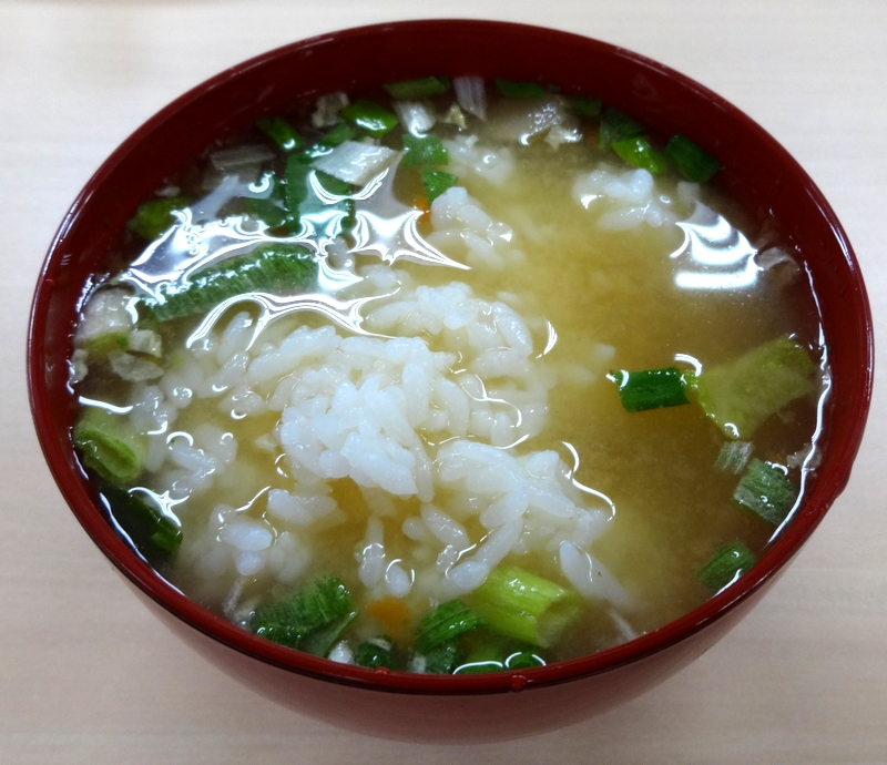 Miso soup and Rice (味噌汁をかけた飯, ねこまんま)